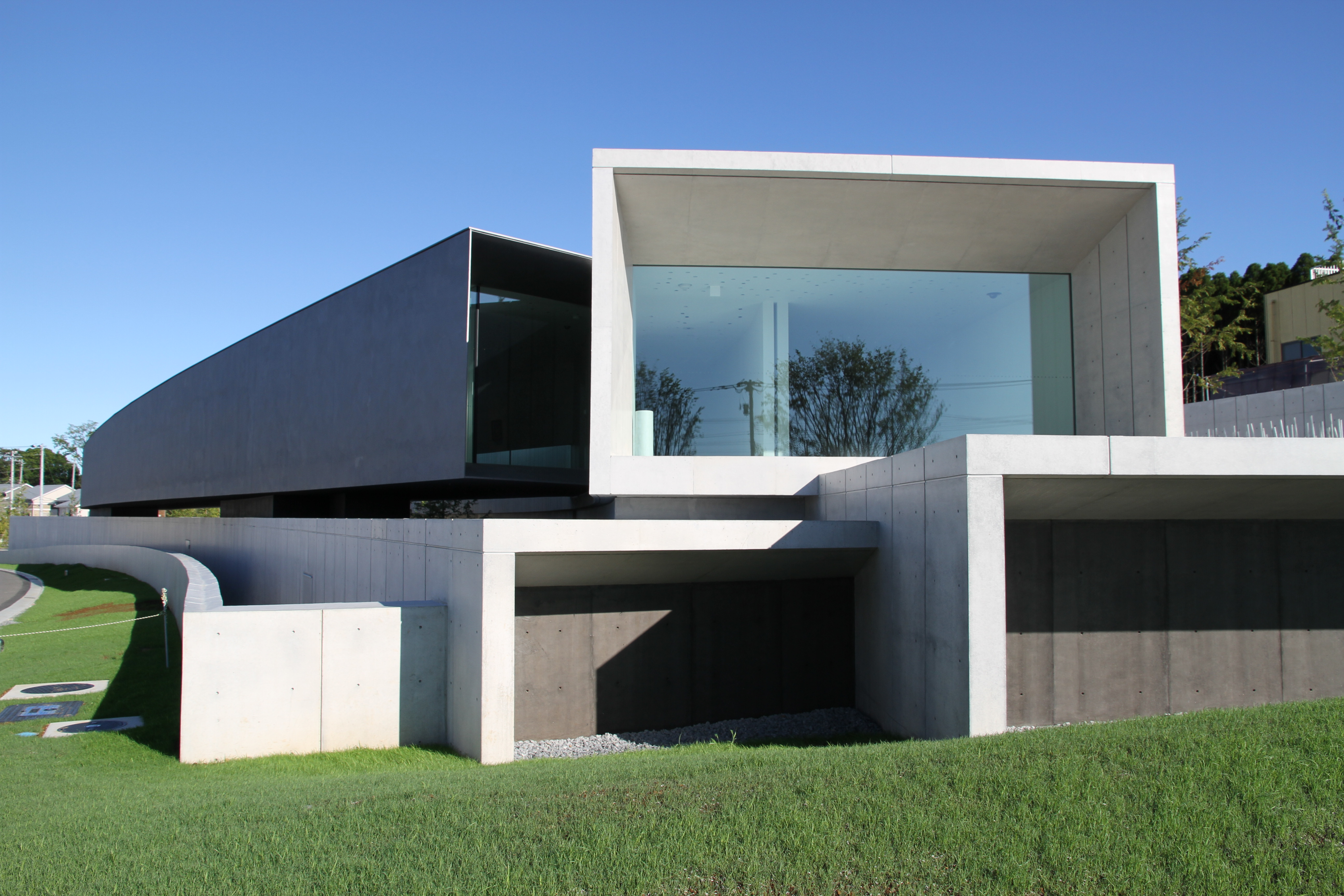 ホキ美術館の外観正面